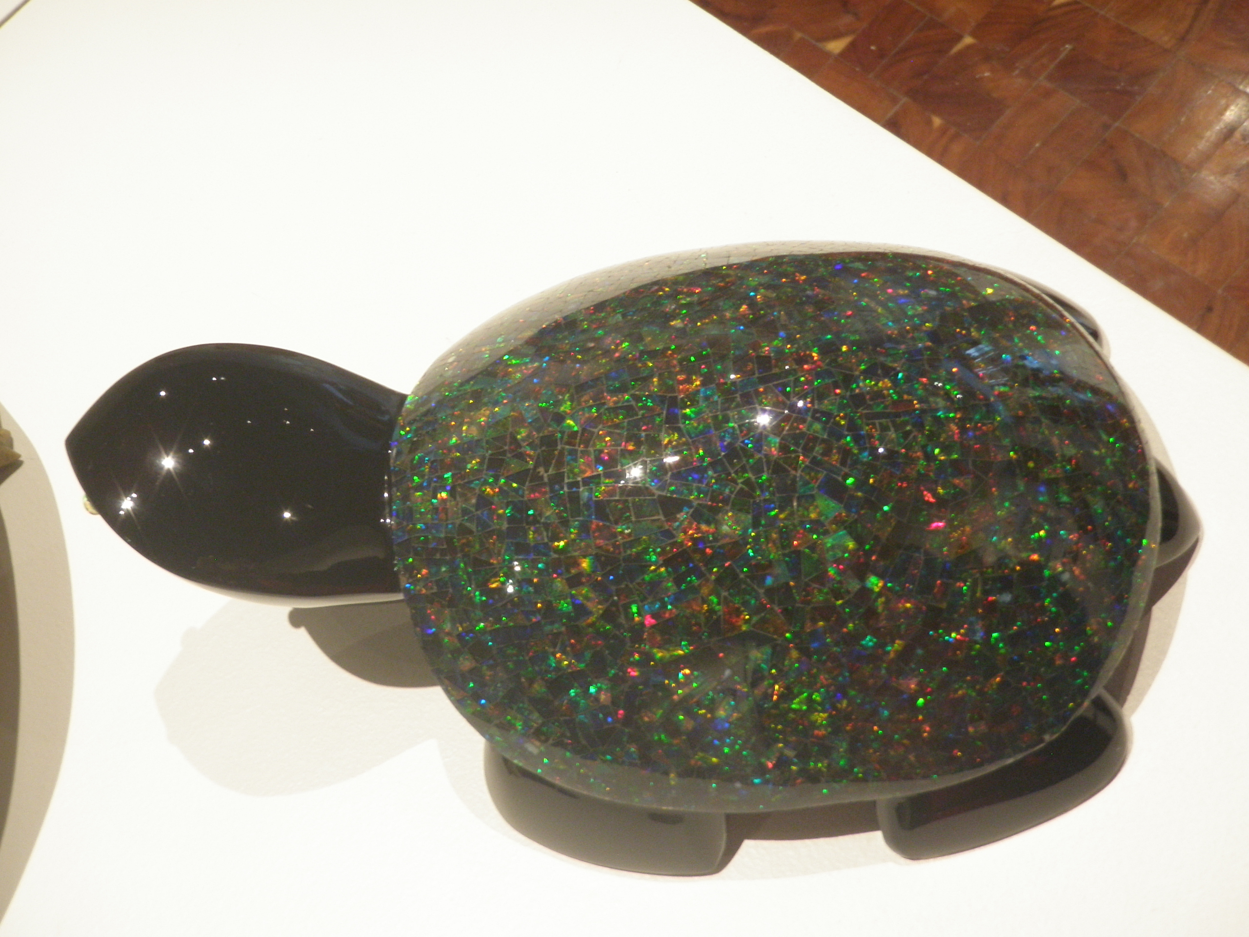 Tortuga provenientes de una comunidad de Magdalena, Jalisco, hecha de obsidiana y ópalo. Mostrado en la colección del Museo se Arte Popular de la Ciudad de México.